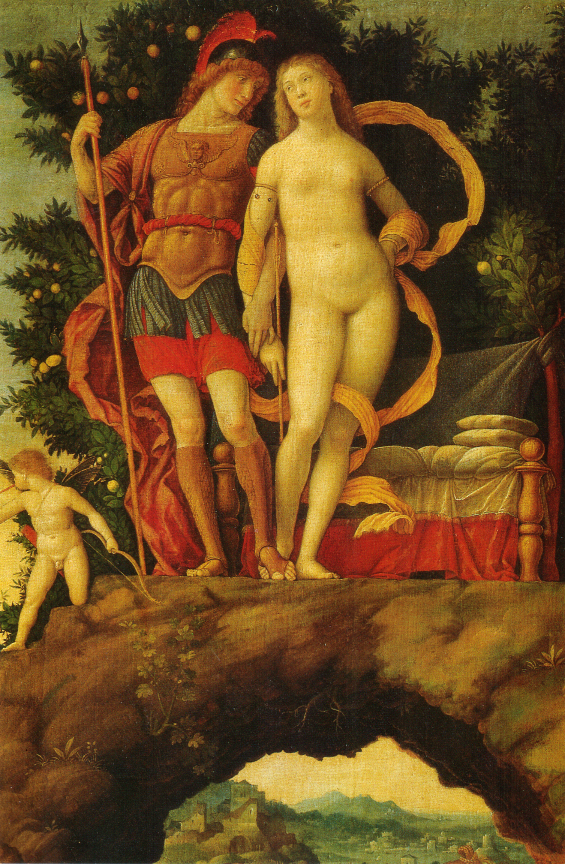 Mantegna, parnaso dettaglio 02.jpg